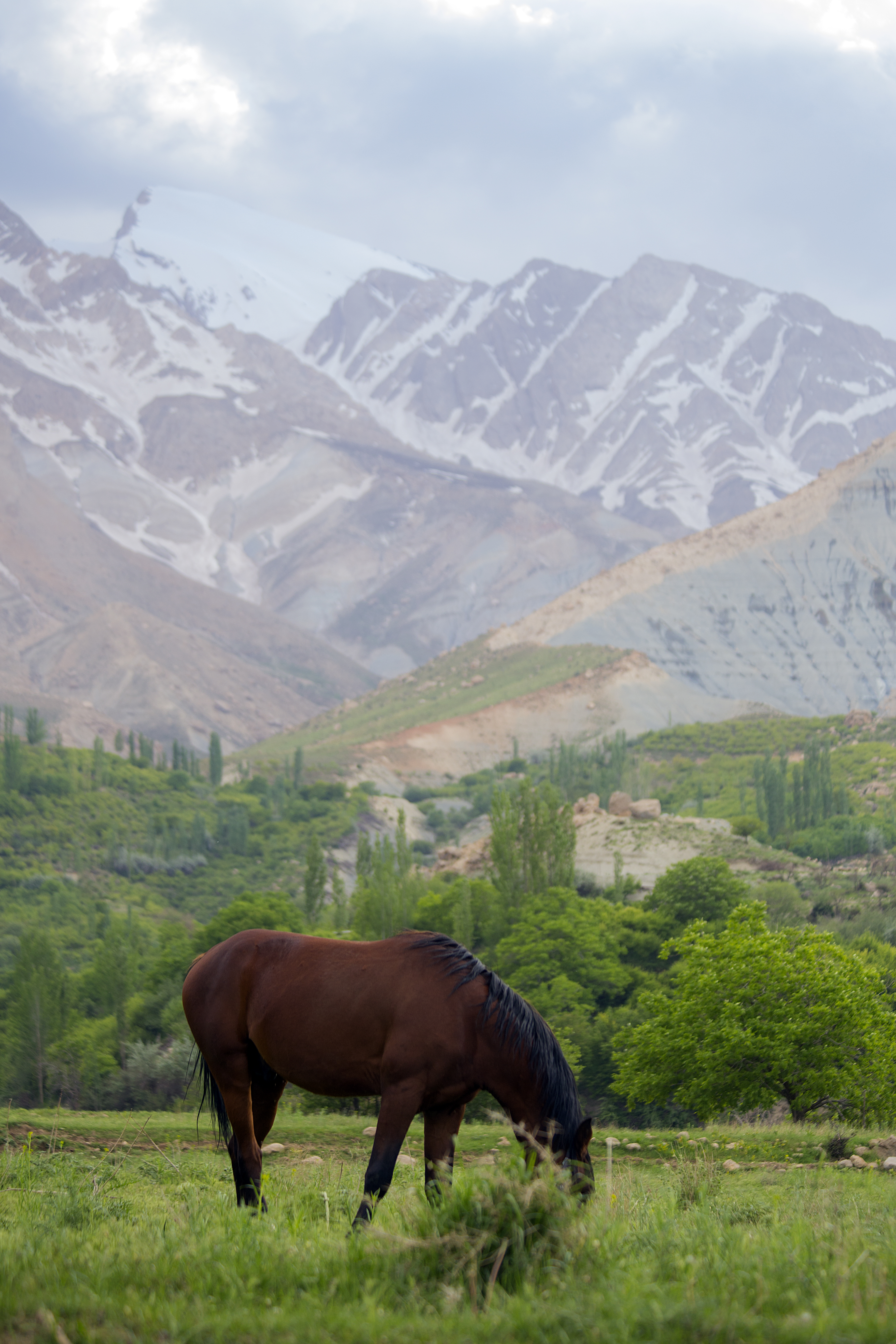 بعضی علت نامگذاری روستا را موقعیت توپوگرافی آن می‌دانند، به طوری که نام اولیه این روستا «خور» به معنای جای گود بوده و این نام به «حفر» و سپس به «خفر» تبدیل شده‌است. همچنین دو امامزاده در این روستا است. روایت دوم کلمه خفر را برگرفته از خور یا غور می‌داند. غور یا غوری نام قبیله یا مردمان اولیه‌ای می‌باشد که در این محل سکونت داشته‌اند. برخی نیز این لغت را برگرفته از گور یا گبر می‌دانند که خود آیینی قبل از اسلام را در منطقه معرفی می‌نماید. روستای خفر به «عروس دنا» نیز معروف است.